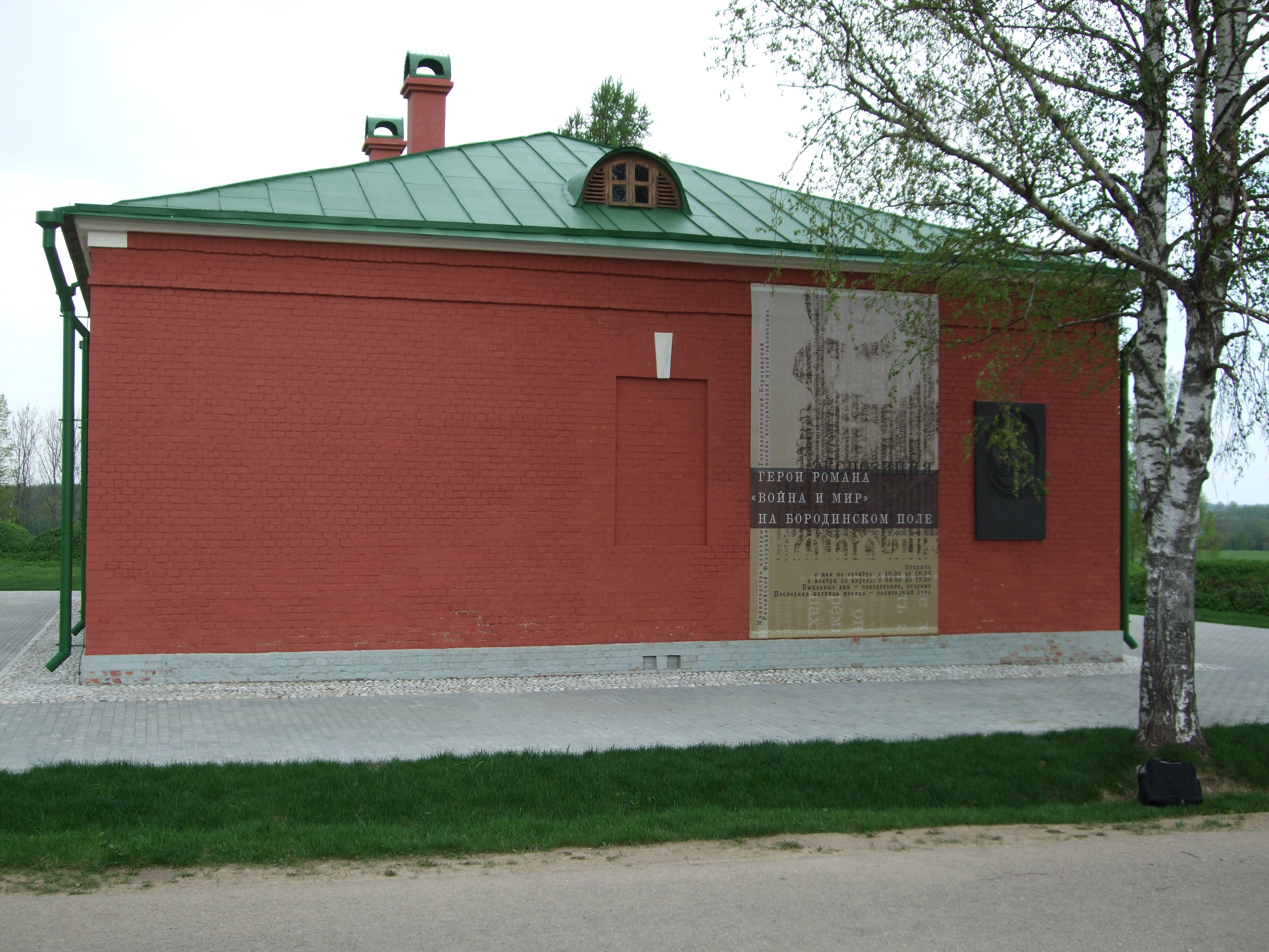 Museu (nos campos de Borodino) dedicado aos heróis de romance "Guerra e paz" (de Lev Tolstoi)